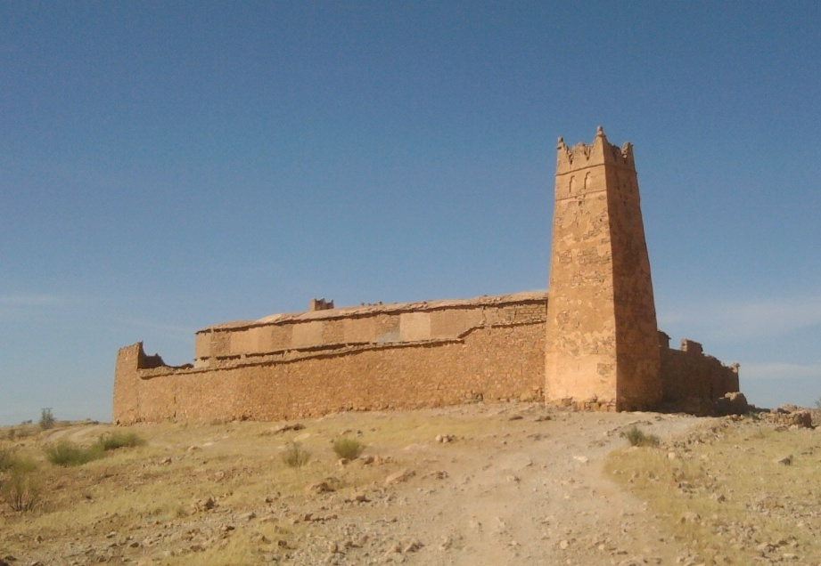 اكادير هو مكان كان يستعمل لتخزين ممتلكات القبيلة من حبوب وامتعة ومعادن كالفضة و الذهب وكان يحرسه رجل امين تعينه القبيلة الامازيغية